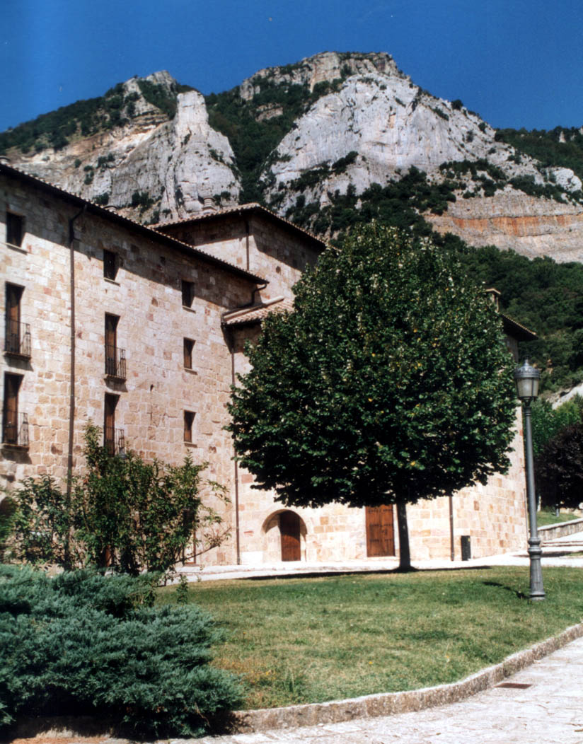 Monasterio de San Salvador de Leire